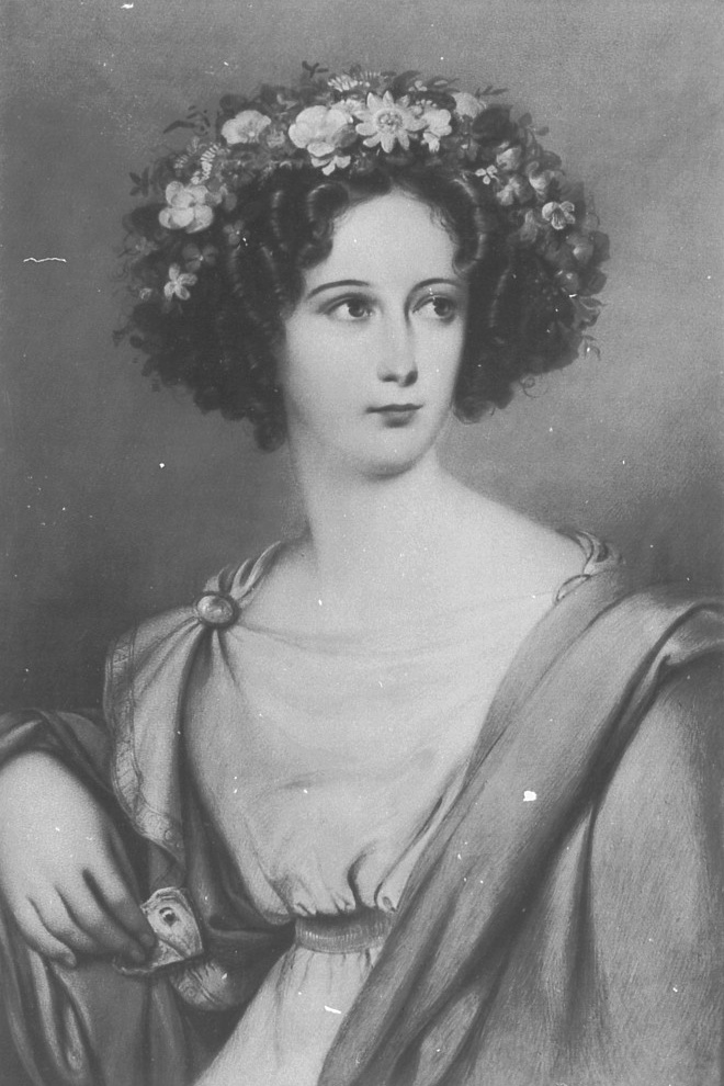 Natalie Gräfin von Kielmannsegge (1803–1884). Lübbenau im Spreewald, Spreewaldmuseum Lübbenau-Lehde